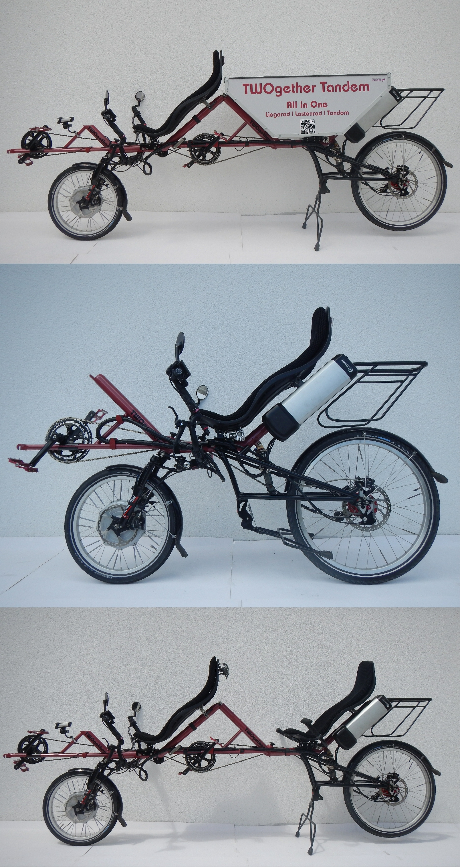 Dieses Liegeradtandem kann in drei verschiedene Arten von Liegerädern umgebaut werden- Tandem, Liegerad und Transportrad.